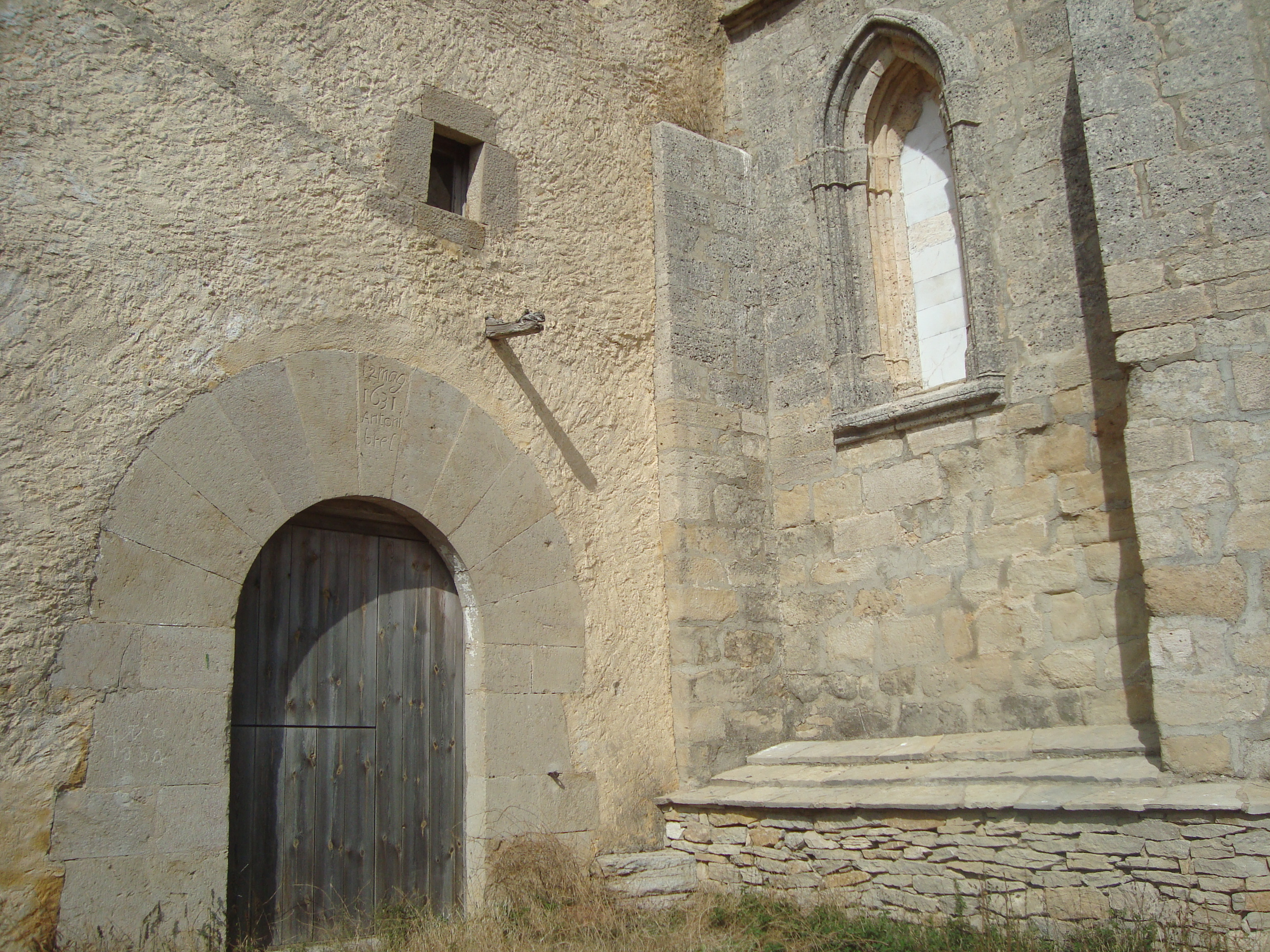 Ermita de Sant Pere (Castellfort)